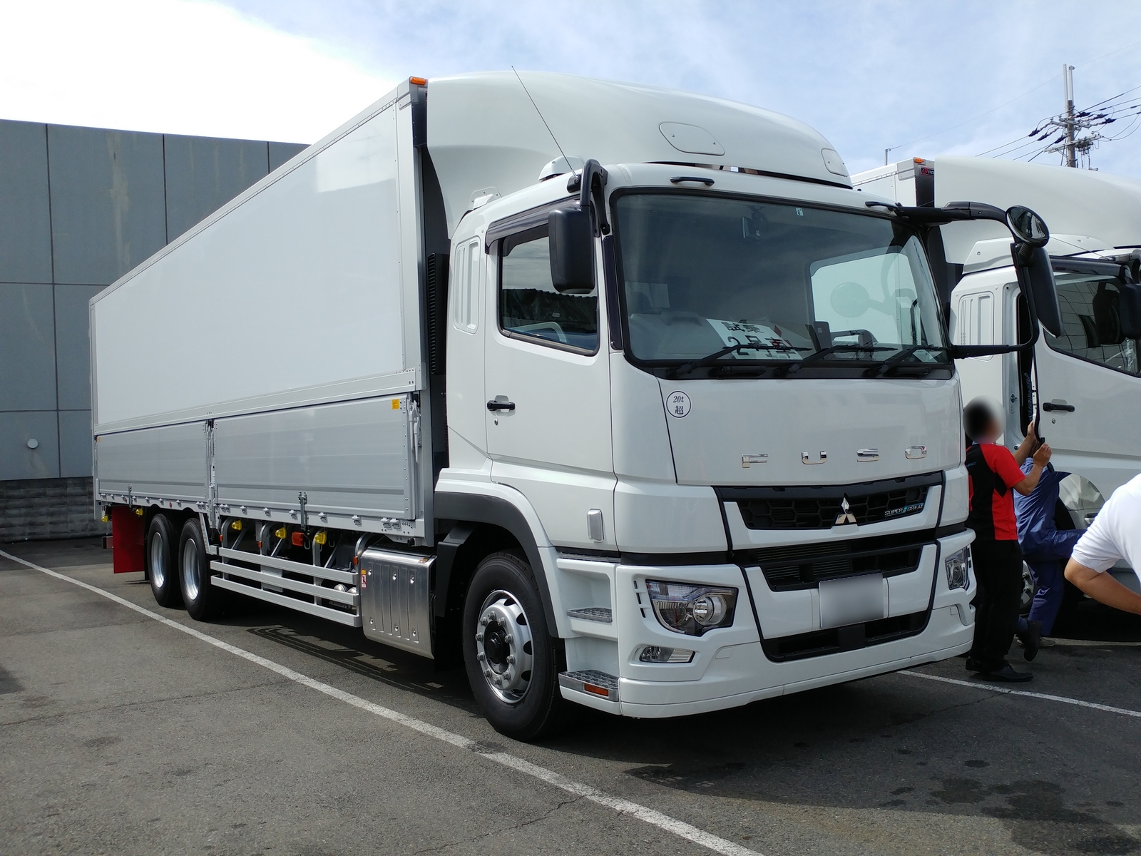 スーパーグレート プロライン(FU)